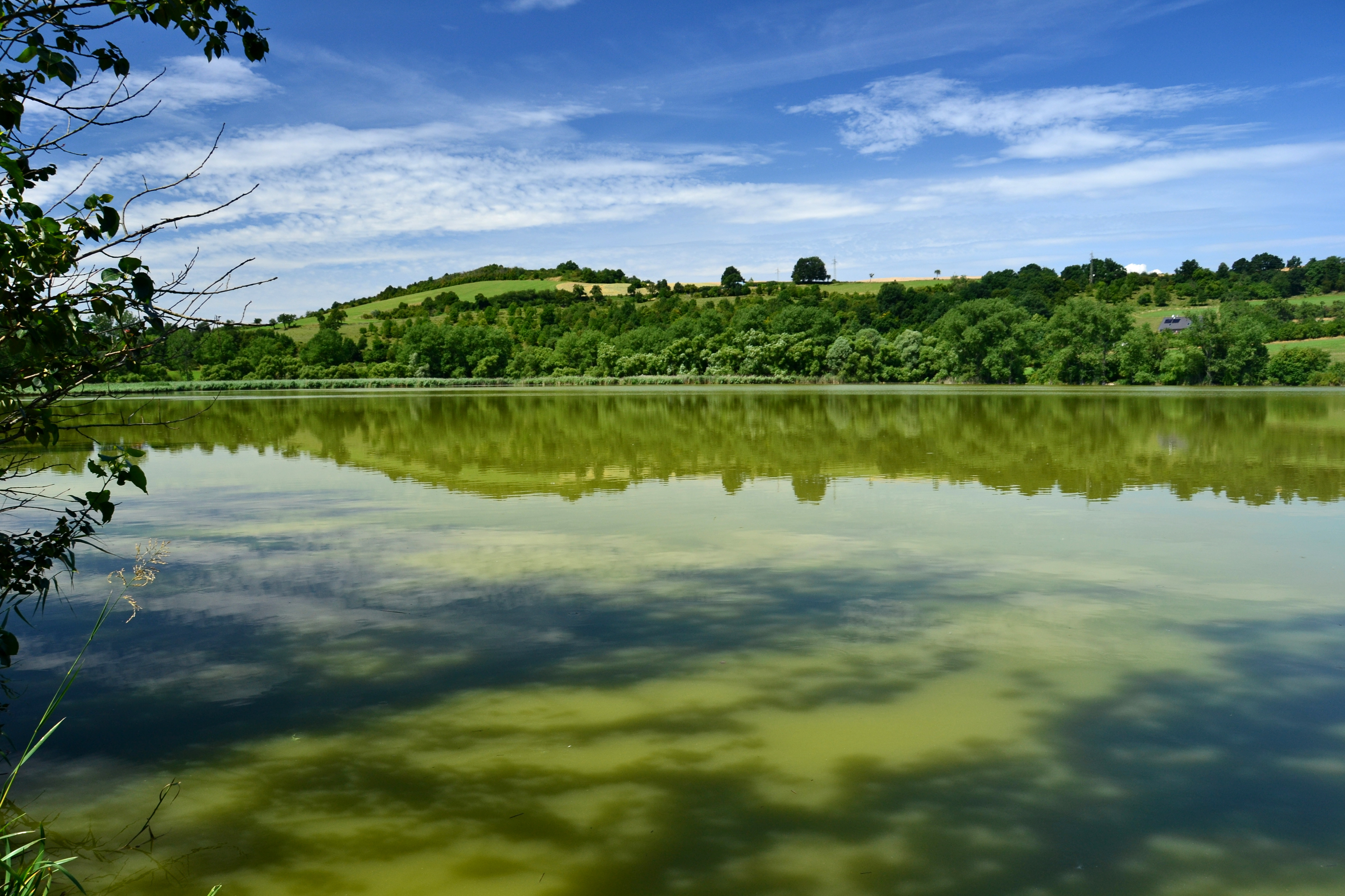 PR Malhostický rybník